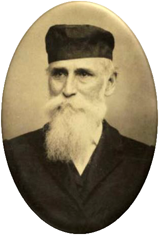 Alexander Hesler